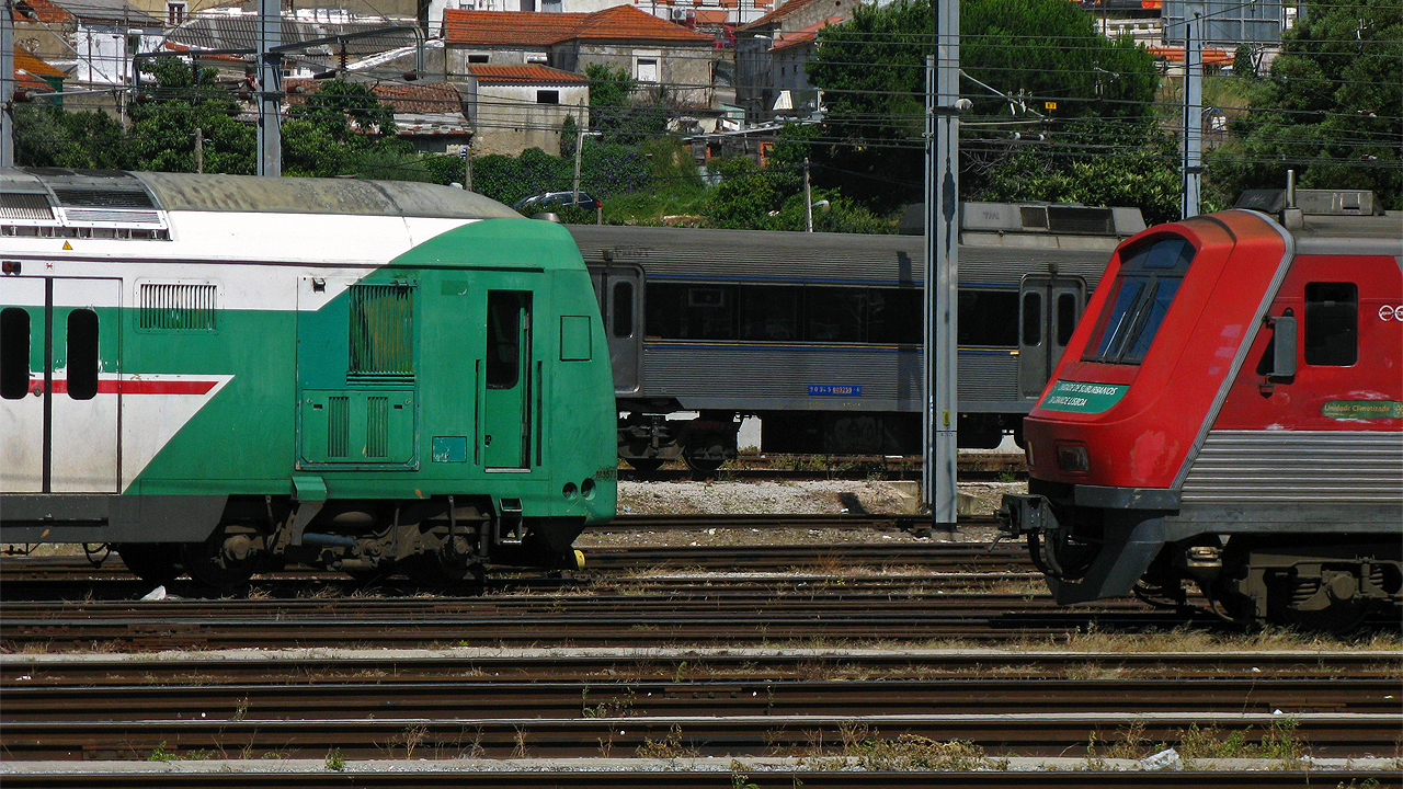 Os 3 tipos de automotora que a CP Lisboa usa: Ao fundo: UQE 3259 representante das UME 3250 / 3150 da Linha de Cascais (não circulando) À esquerda: UQE 3523 representante das UQE 3500 Linha de Cintura / Azambuja À direita: UBE 2??? representante das UQE 2300 / 2400 das Linhas de Sintra / Sado Campolide 07/07/2009